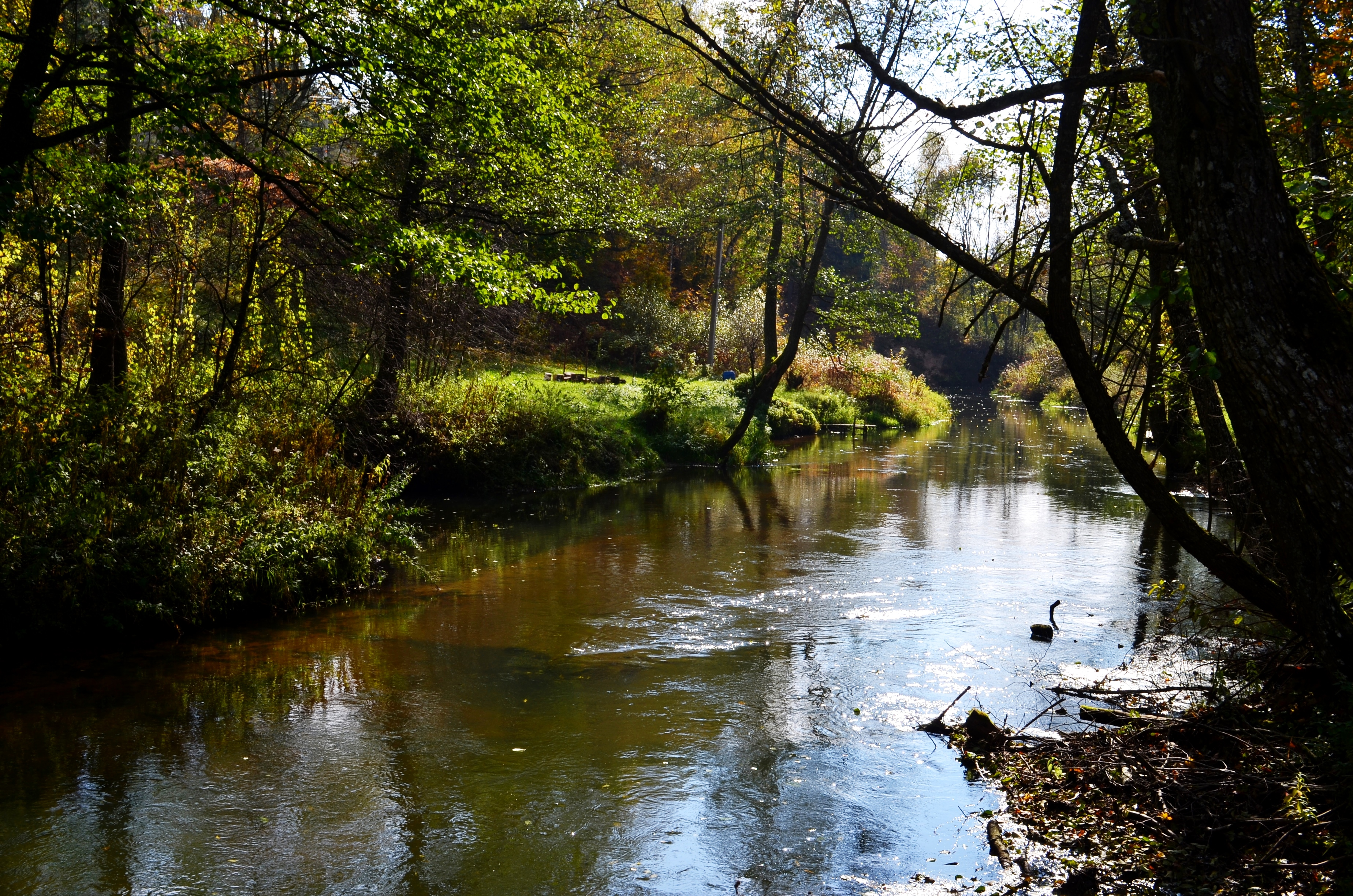 Ūlos upė Zervynose